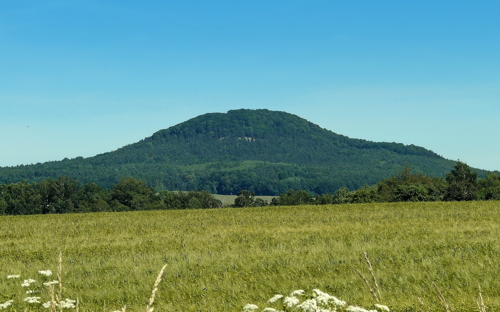 Vrch Šedina od západu